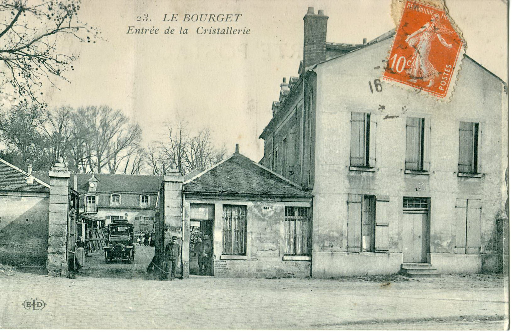 Carte postale ancienne éditée par ELD, N°23 Le Bourget (93) : Entrée de la Cristallerie